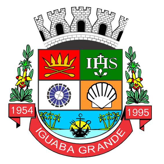 Brasão de armas do município de Iguaba Grande, no estado do Rio de Janeiro (domínio público segundo os critérios legais).